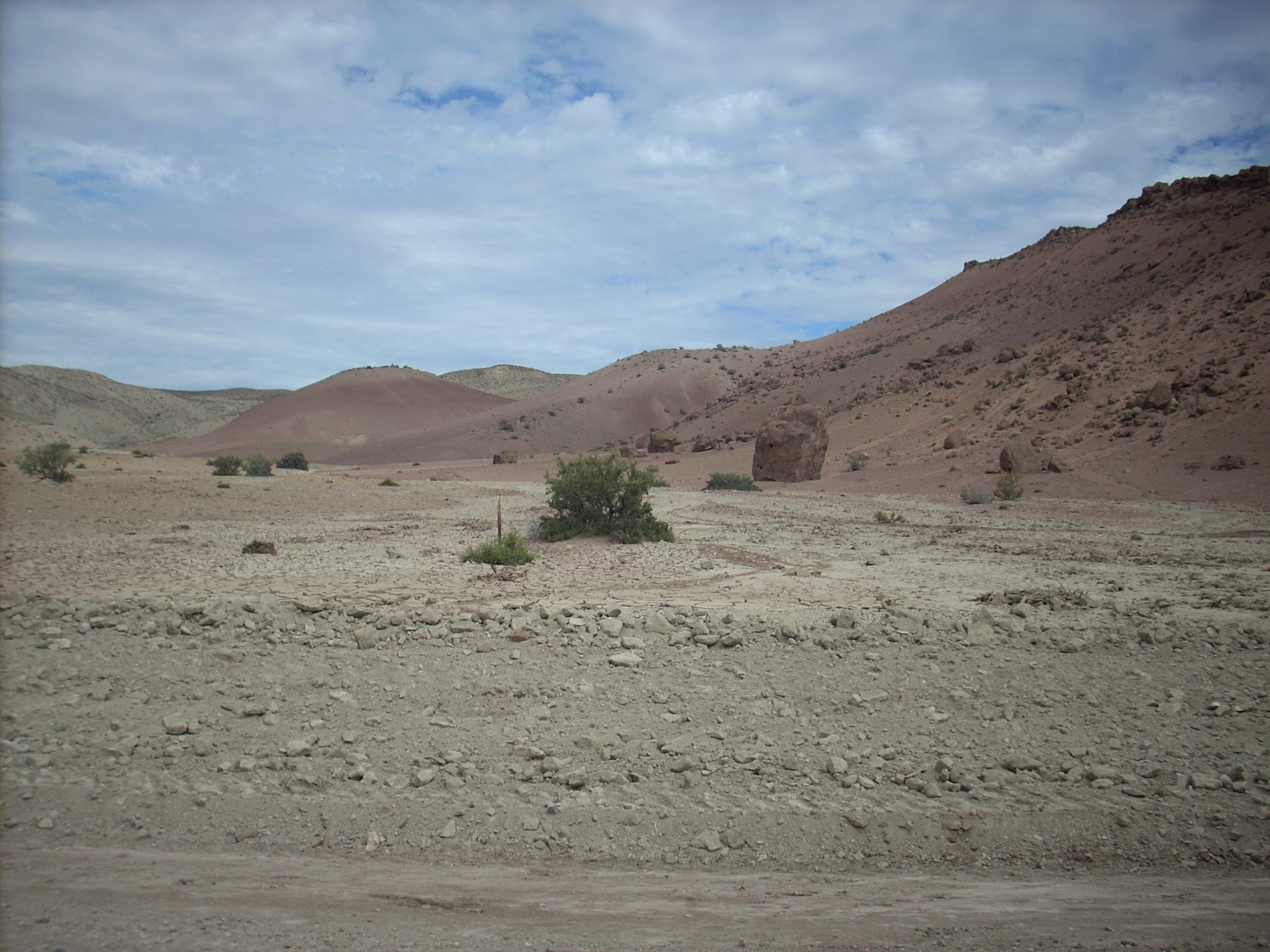 Vista del paisaje tipico de la Patagonia, cerca de Paso del Sapo